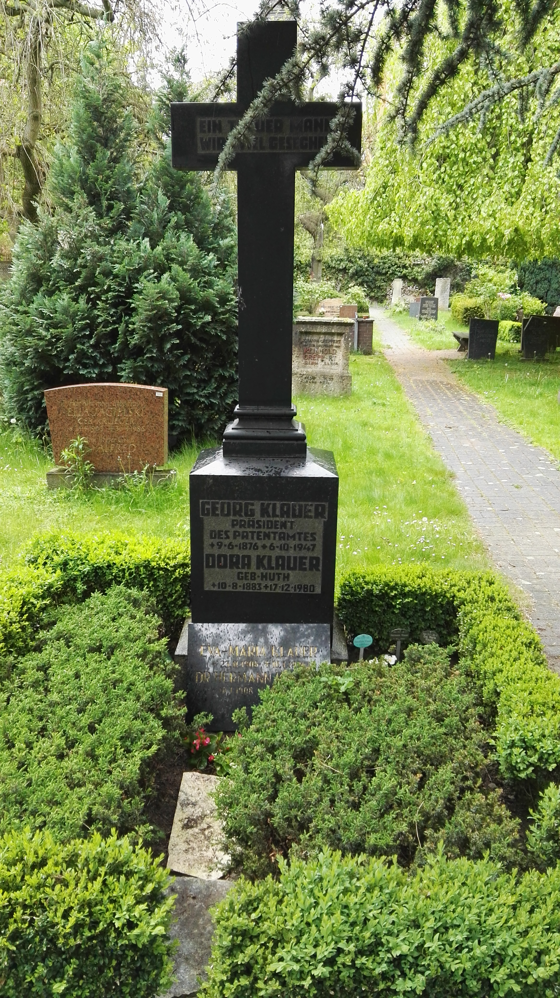 Grabstätte von Georg Klauer auf dem Alter Friedhof der Zwölf-Apostel-Gemeinde in Berlin-Schönberg